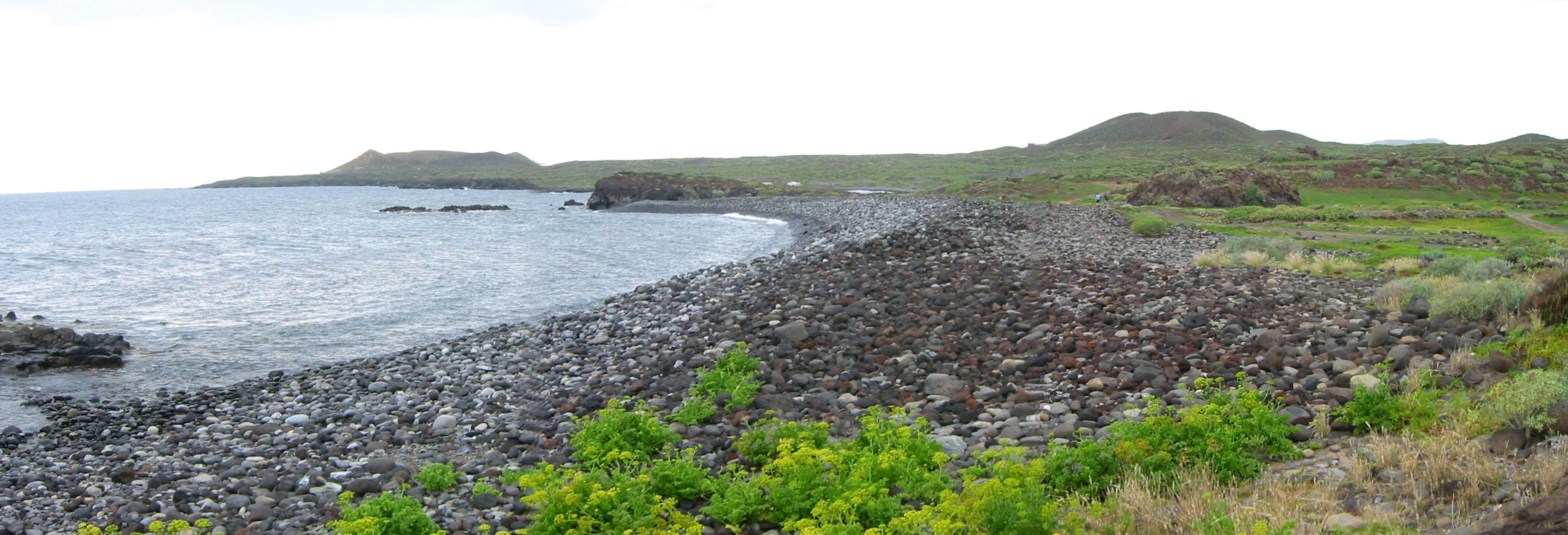 Costa en San Miguel de Abona. Al fondo Montaña Amarilla.